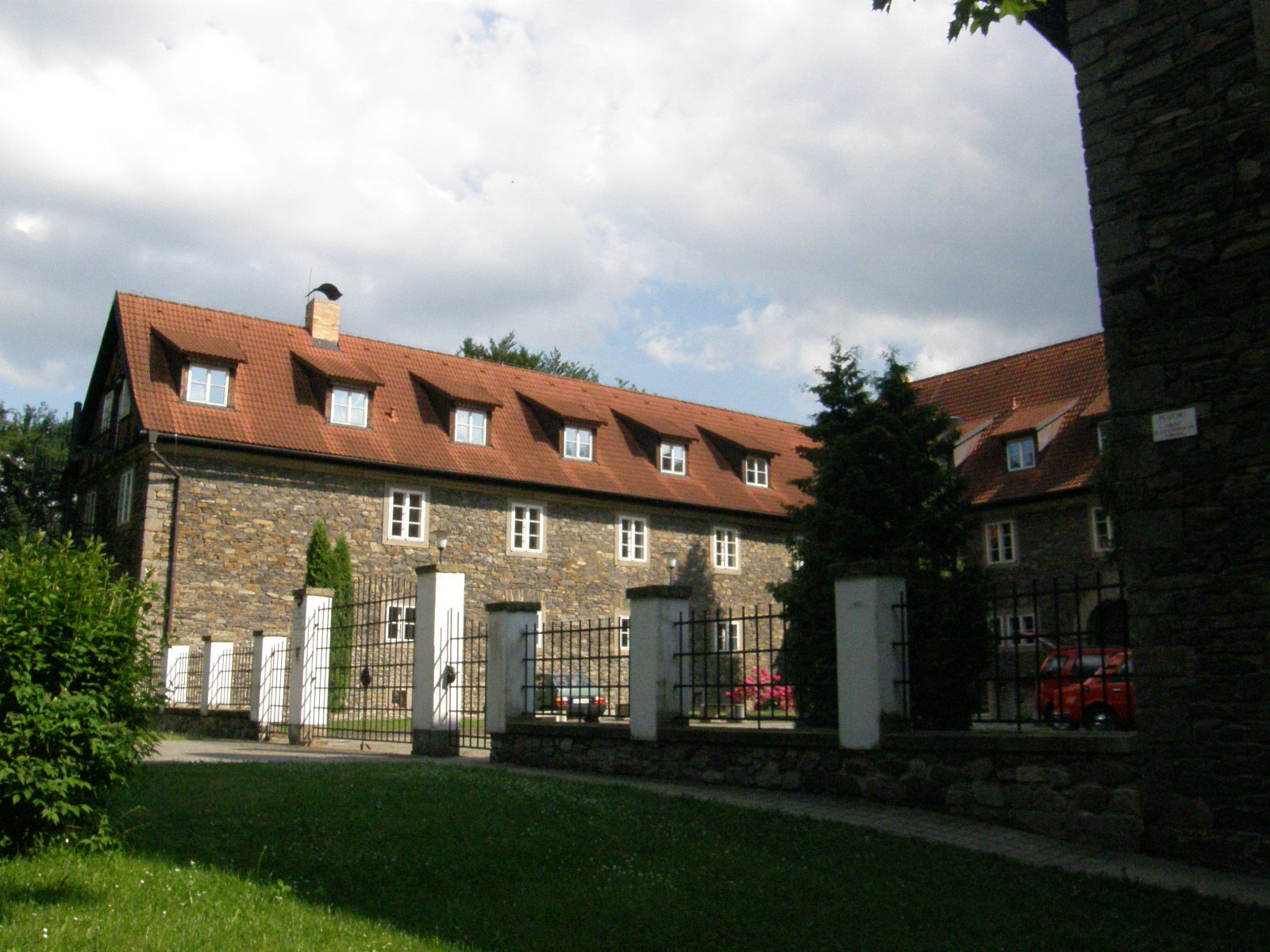 Hrádek v parku Heulos v jihlavě, architekt Fritz G. Winter.